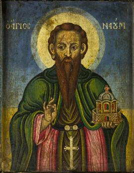 Св. Наум, црква Св. Кирил и Методиј,Тетово. Околу 1853 година. Автор: се атрибуира на Анастас од Крушево. Дим: 25,5 Х 20 Х 2 см